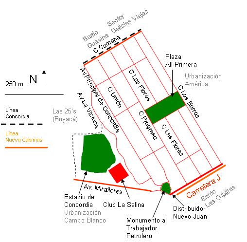 Mapa del sector Concordia de Cabimas. Estado Zulia. Venezuela